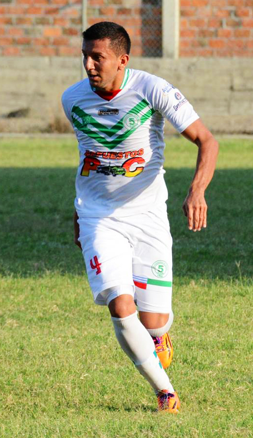 Esteban Villaprado jugando para 5 de Julio en el 2014